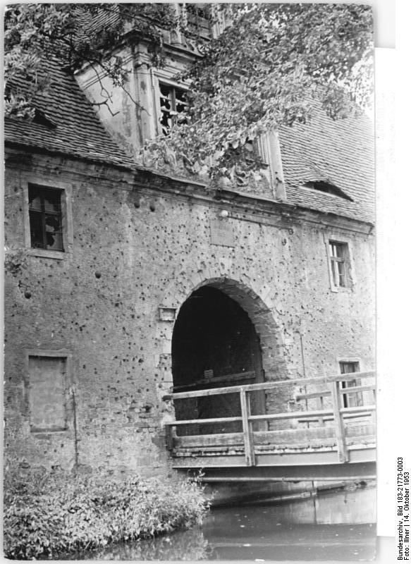 Leipzig, Dölitzer Schloss Zentralbild Illner 14.10.1953 140 Jahr-Feier der Völkerschlacht in Leipzig Auf dem historischen Boden der Völkerschlacht bei Leipzig, wo vor 140 Jahren, vom 16. bis 18.10.1813 das deutsche und das russische Volk in treuer Waffenbrüderschaft gemeinsam gegen die napoleanische Unterdrückung siegreich kämpften. In diesem Jahr werden sich Menschen aus Ost und West zusammenfinden, um der unverbrüchlichen Freundschaft der deutschen mit den russischen Menschen zu gedenken, einer Freundschaft, die heute noch stärker als vor 140 Jahren Unterpfand für die glückliche Zukunft aller Menschen ist. UBz: Das Dölitzer Schloß trägt noch heute die Anzeichen des Kampfes vom 16. Oktober 1813. Auf der ganzen Front des Torhauses sind die Einschläge der Gewehrkugeln und etliche Kanonenkugeln, die im Gemäuer steckengeblieben sind, zu sehen. Eine Erinnerungstafel trägt folgende Anschrift: "Zur Erinnerung an die ruhmvolle Erstürmung und Verteidigung dieses Herrensitzes am 16.10.1813 durch das Österreichische Infanterieregiment Freiherr von Strauch Nr. 24 und Abteilungen des Infanterieregiments Graf Kaunitz-Rietberg Nr. 20., Oberst Sammel von Reissenfeld, Kommandant des Infanterieregiments Nr. 24 fand hier den Heldentod."